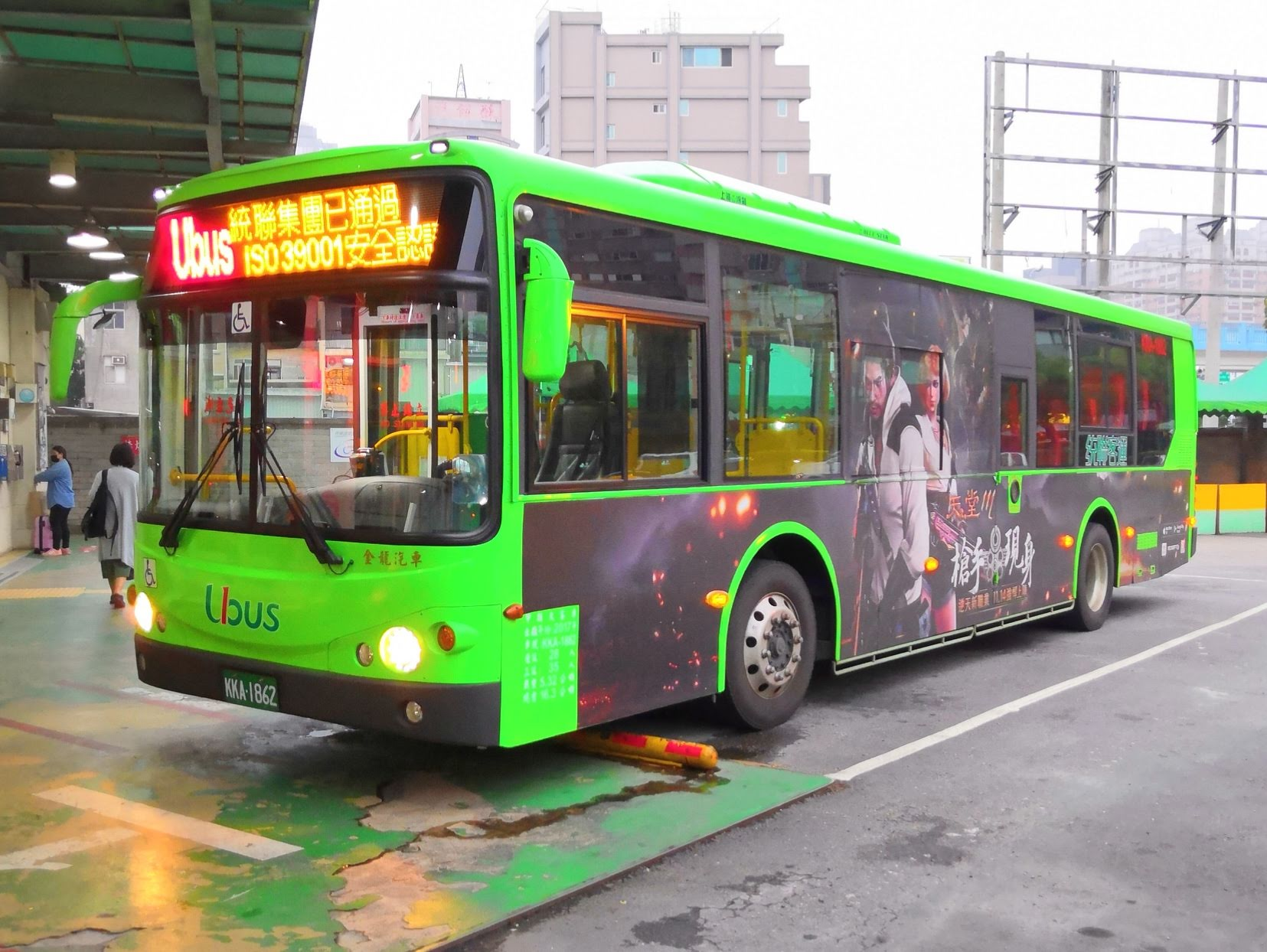 統聯客運台中市公車73路 金龍汽車製造KL6112U1大客車 KKA1862